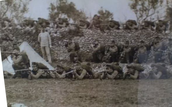 23. landwehr pukovnija, Zadar, vježba